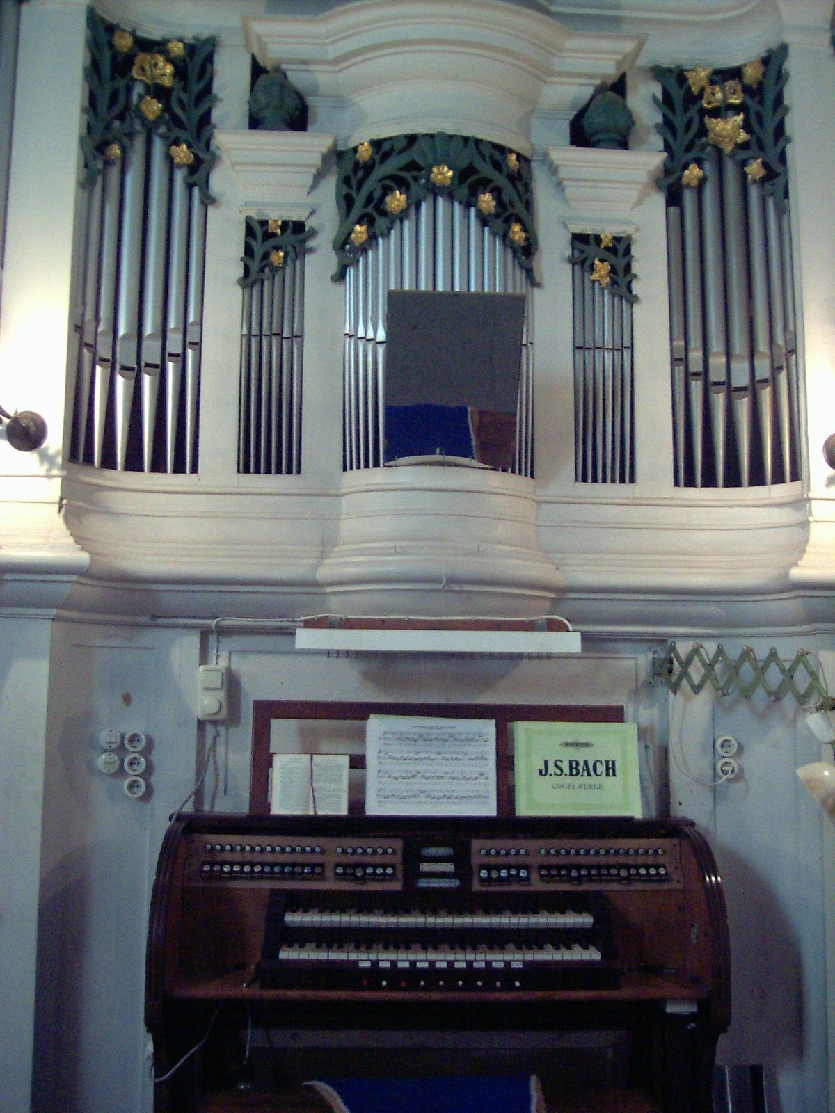 Blankenhain-Orgel